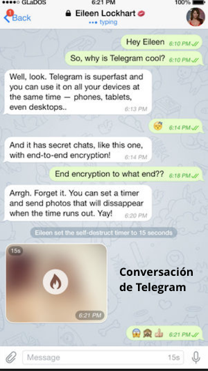 En el archivo se muestra una conversación de Telegram, sistema de mensajería instantanea desde 2013.